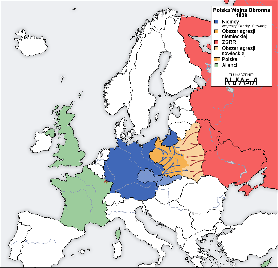 Kampania_wrześniowa 1939. Mapa pokazuje początek II Wojny Swiatowej w kontekście Europy Środkowej. II Rzeczpospolita, jeden z trzech pierwszych Aliantów, została zaatakowana i podzielona między III Rzeszę i Związek Sowiecki, wzdłuż linii ustalonej w tajnym protokole paktu Ribbentrop - Mołotow, dzielącego centralną i wschodnią Europę między oba kraje. Polskimi sojusznikami w tamtym czasie były Francja i Wielka Brytania.